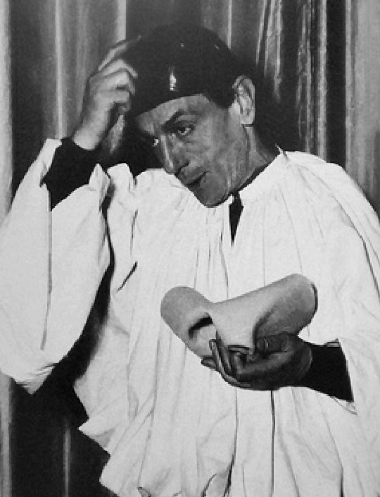 Eduardo De Filippo in scena truccato da Pulcinella